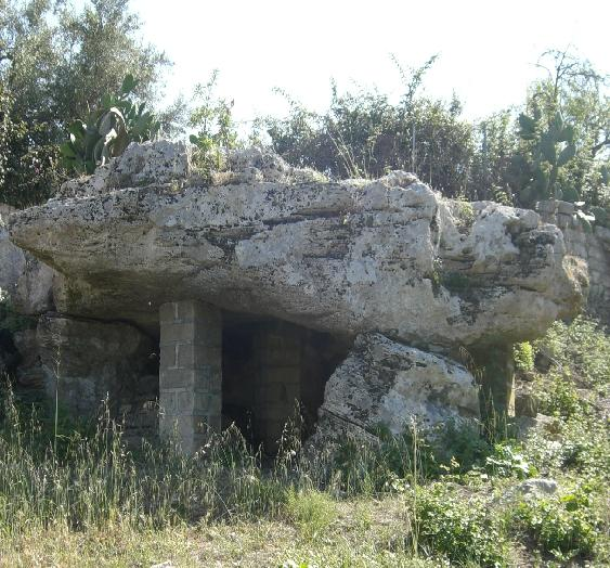 Dolmen situato ad Avola (SR), Italia. Immagine by S. Piccolo